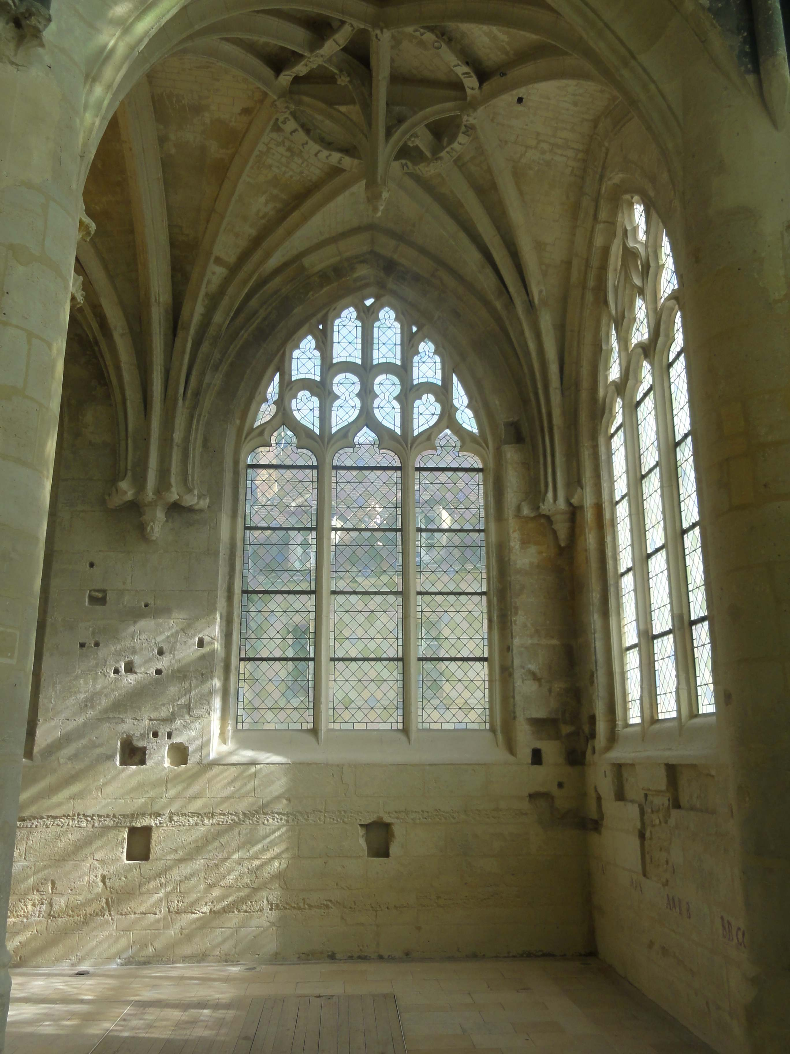 Intérieur de l'église - voir titre.